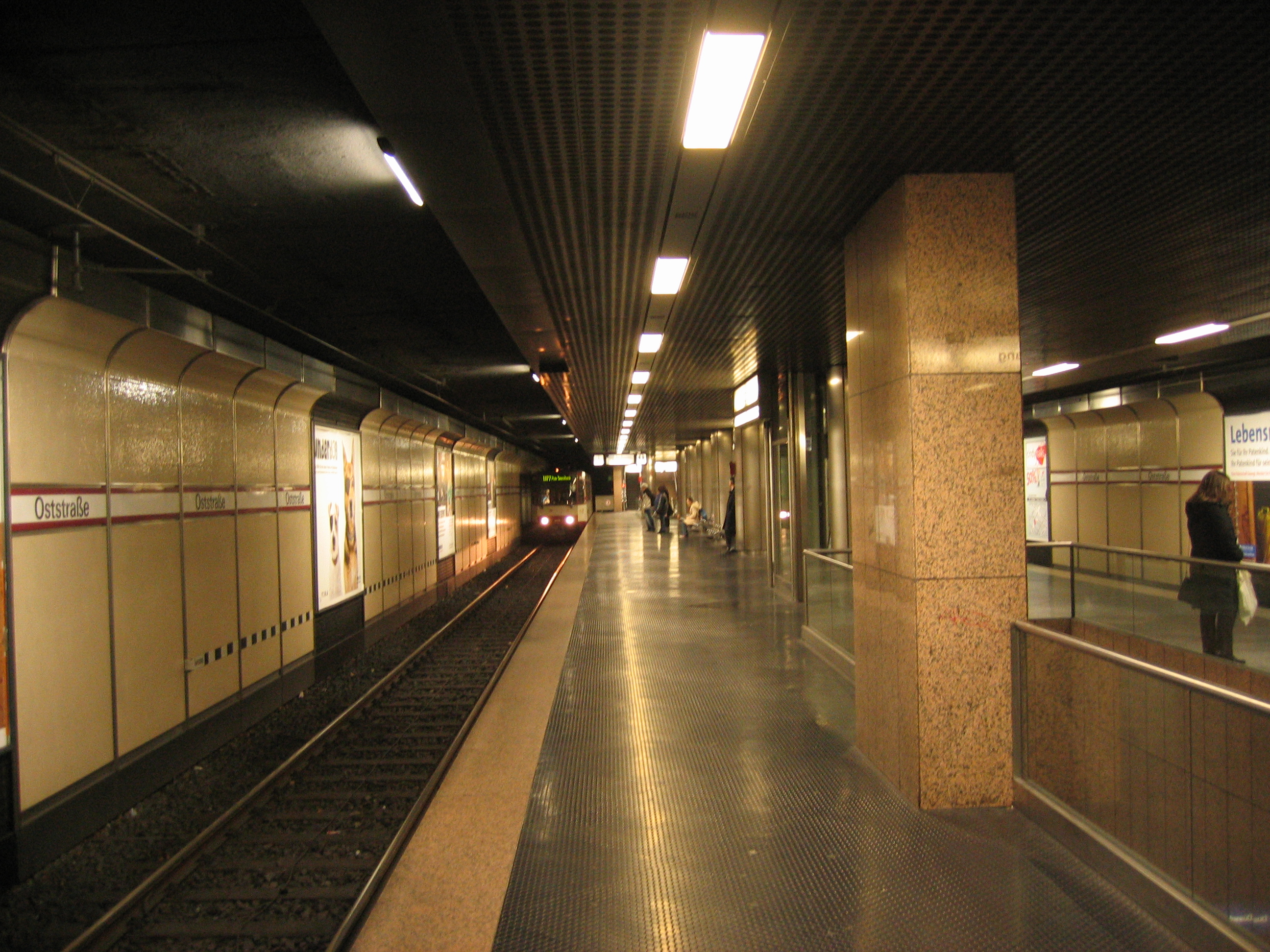 Stadtbahn Düsseldorf, U-Bahnhof Oststraße